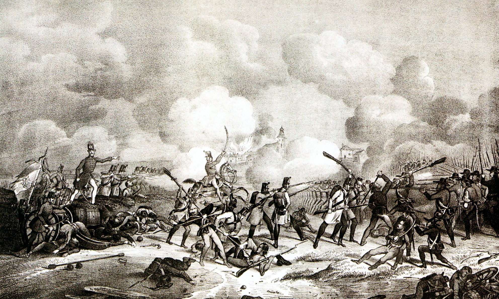 A perlaszi ütközet 1848. szeptember 2-án. A. Strohmayer litográfiája